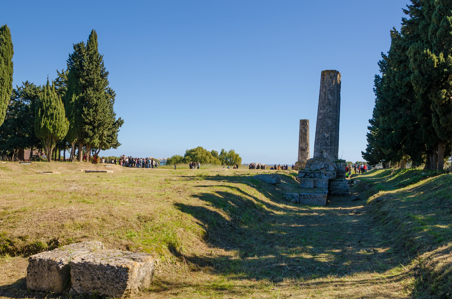 Tempio di Zeus Olimpico Siracusa